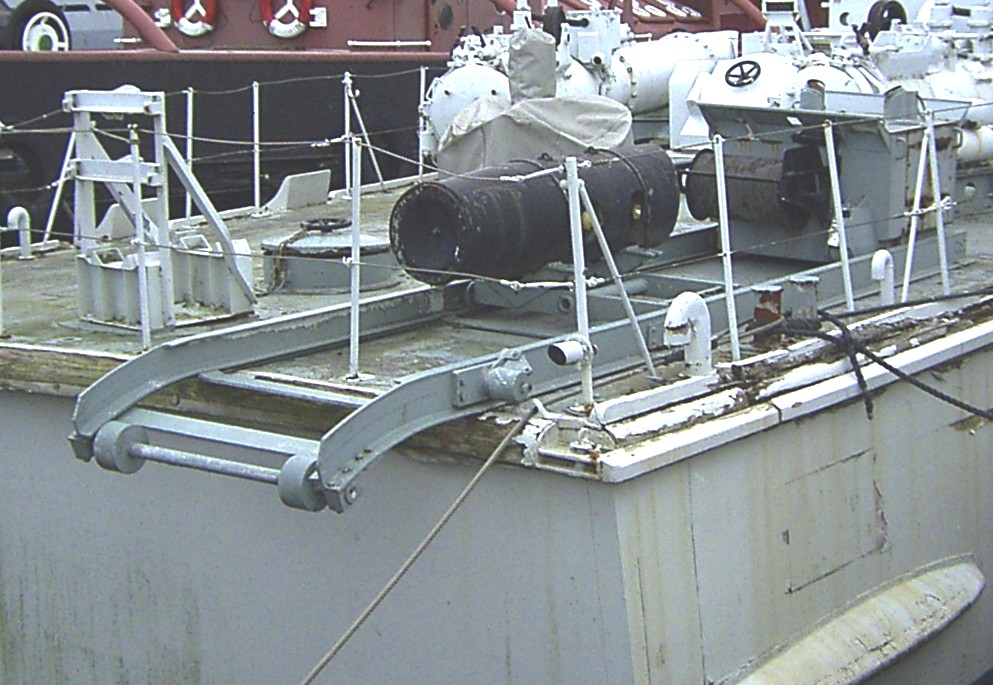 Schiene zum Legen von Seeminen mit zwei Beispielen von Minen (bzw. einem Grundgewicht ohne den Minenkörper) auf dem Schnellboot "Kranich" der Jaguar-Klasse. Es ist nur die eine hintere Abwurfkante mit einem kurzen Schienenstück montiert. Zum Minenlegen wäre beidseitig das hintere Torpedorohr entfernt und Schiene bis hinter das vordere Torpedorohr verlegt worden.